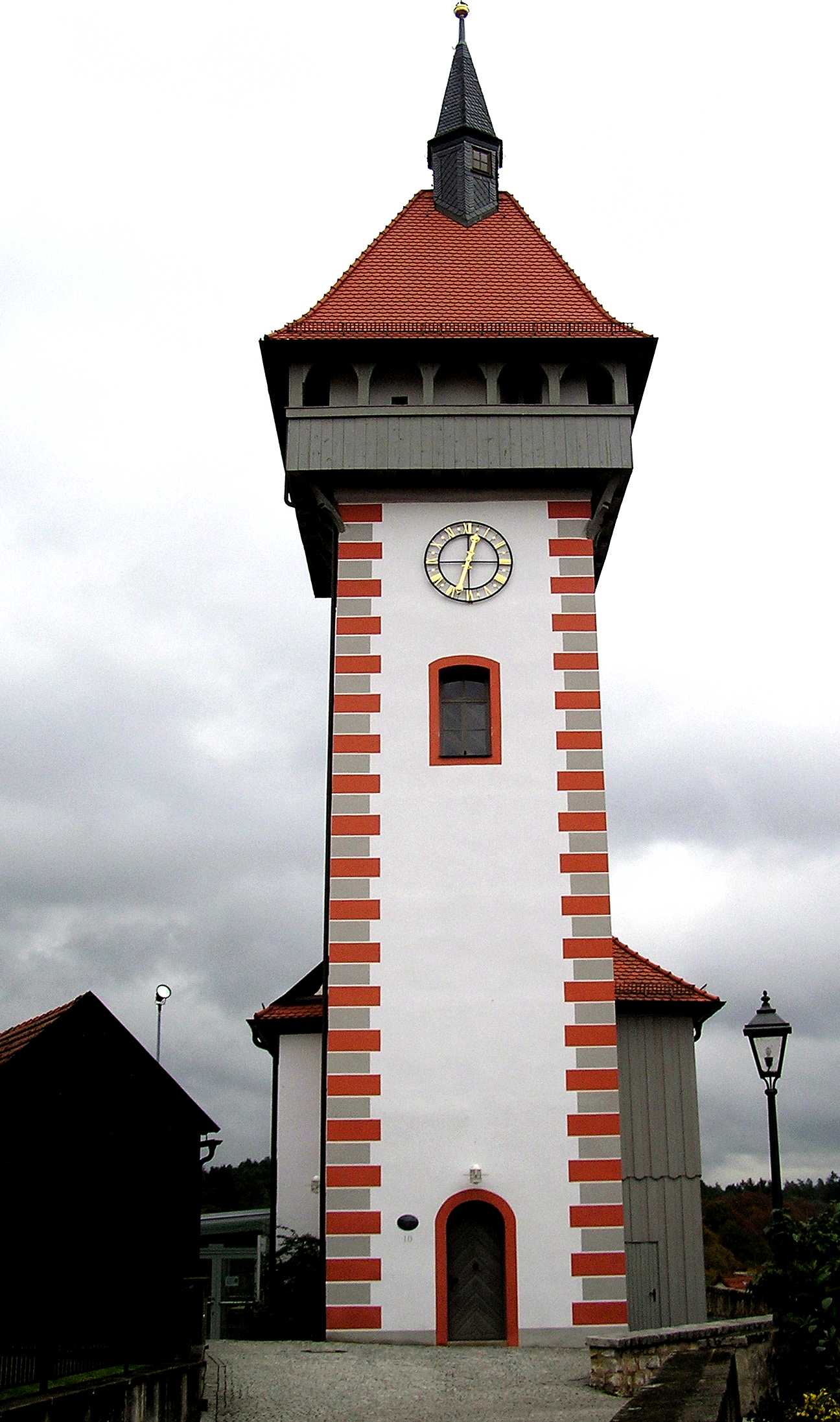 Hollfeld St. Gangolf